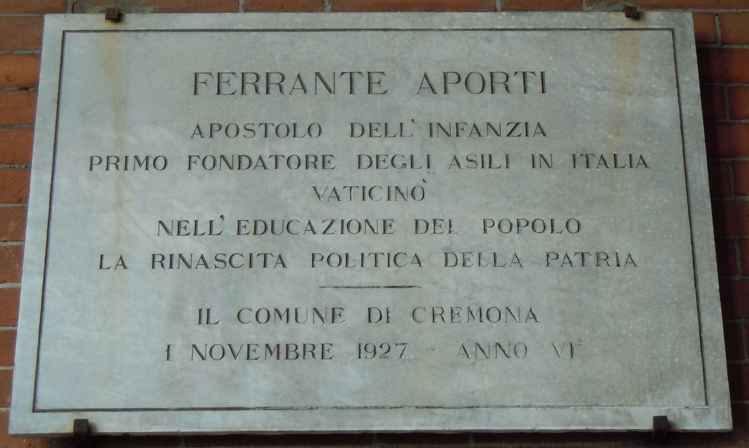 Cremona, lapide a Ferrante Aporti.